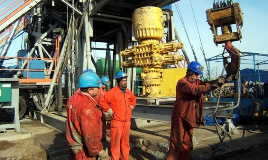 Muncitori din industria petroliera înlocuind un motor de sondă - Schela Oprişeneşti